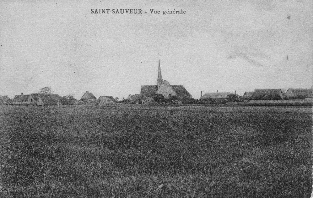 vue générale de Saint-Sauveur, Isère, France.